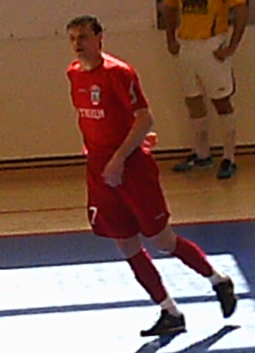 Данил Кутузов в матче против «Политеха»